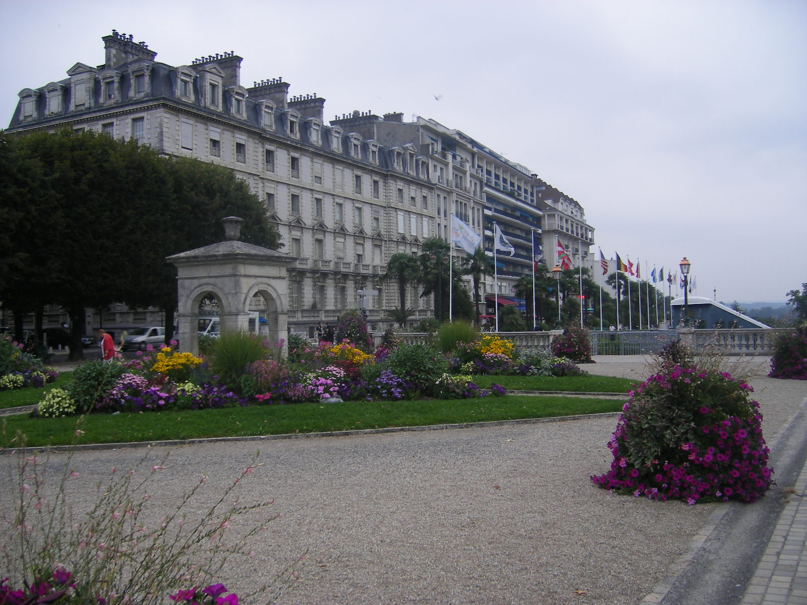 Pau